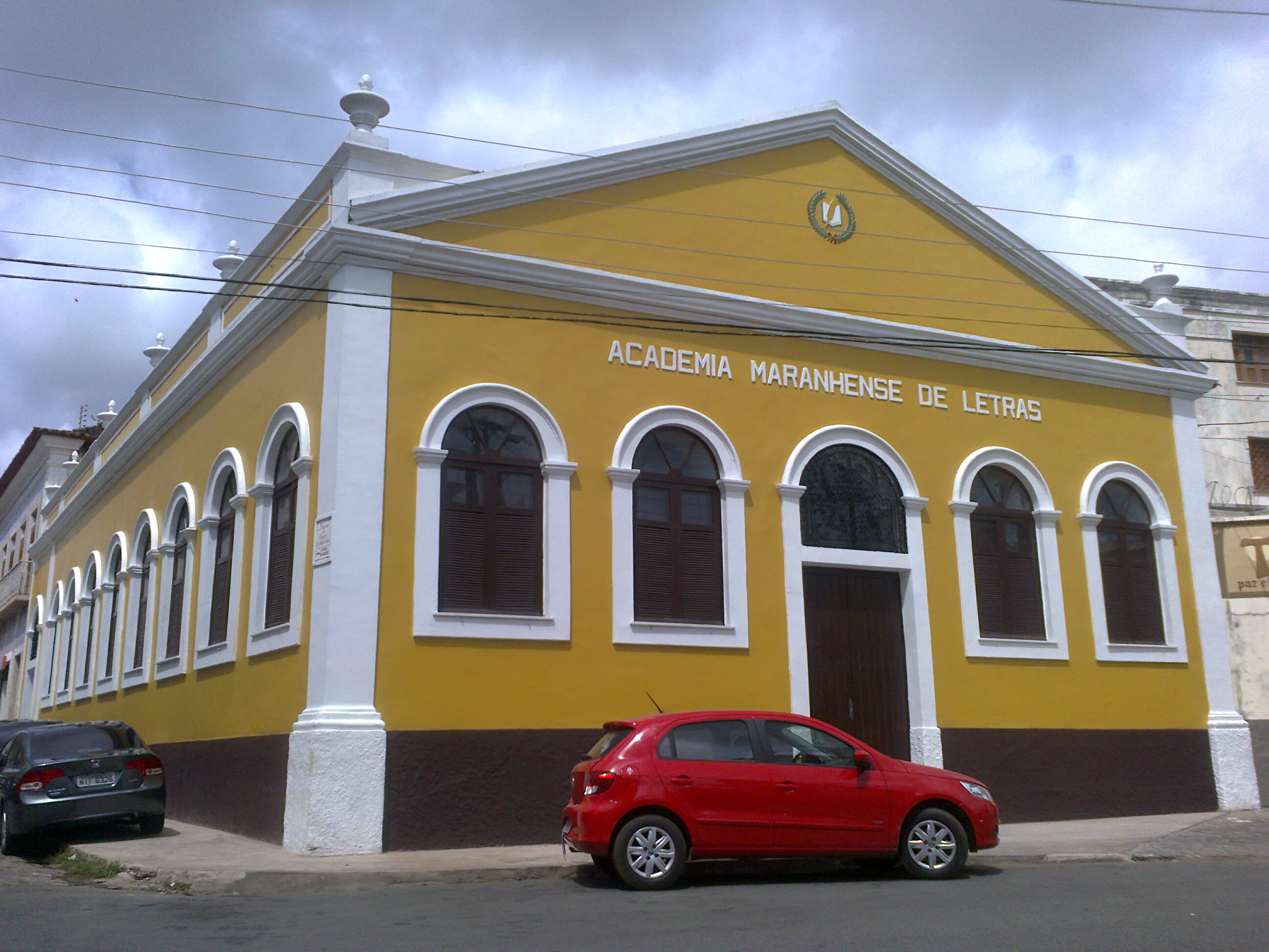 Sede da Academia Maranhense de Letras, em São Luís.